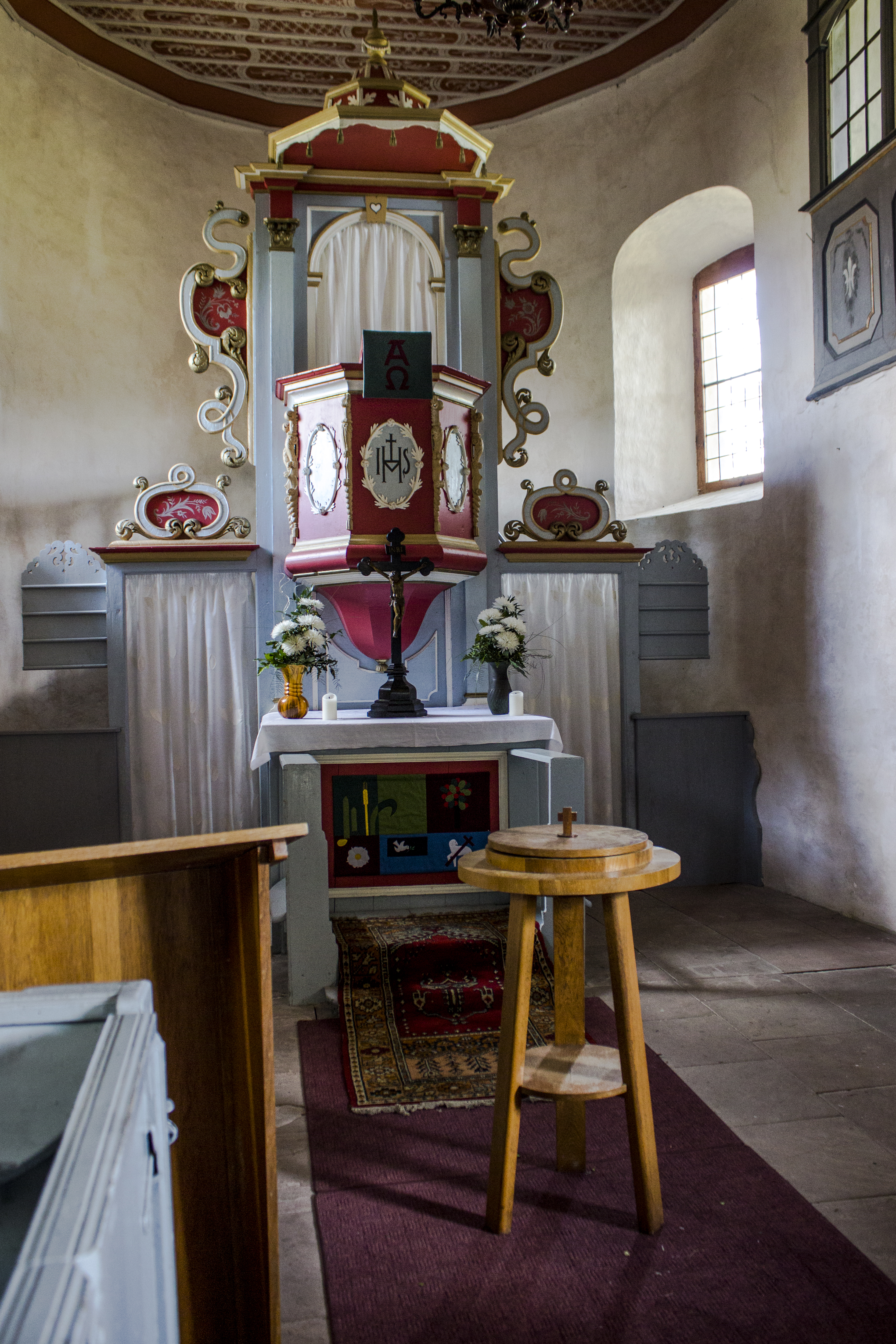 Innenansicht